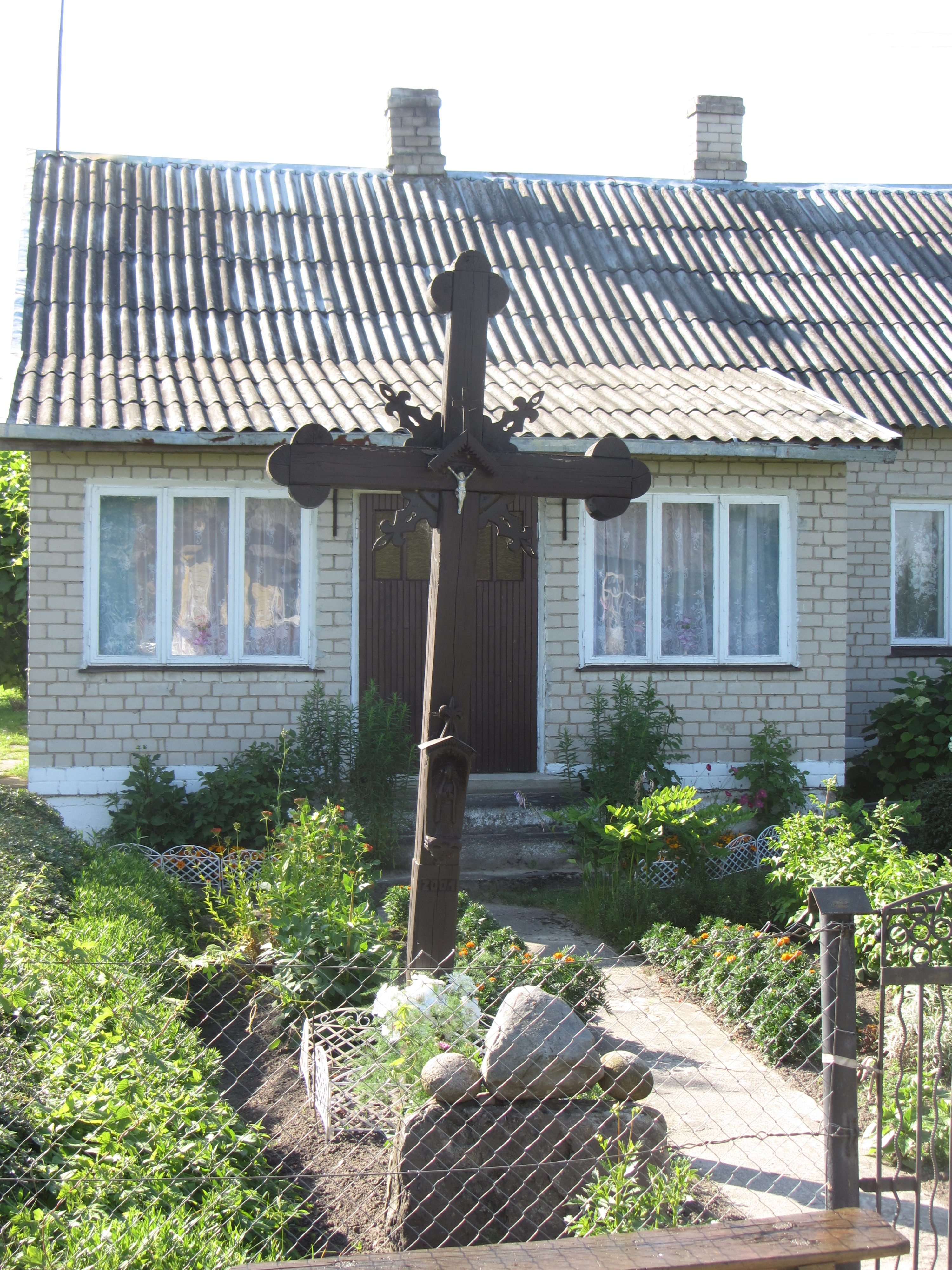 Panočiai, Lithuania